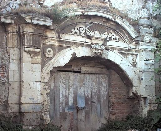 Porta della Cittadella di Messina, opera di Domenico Biundo e Antonio Amato.